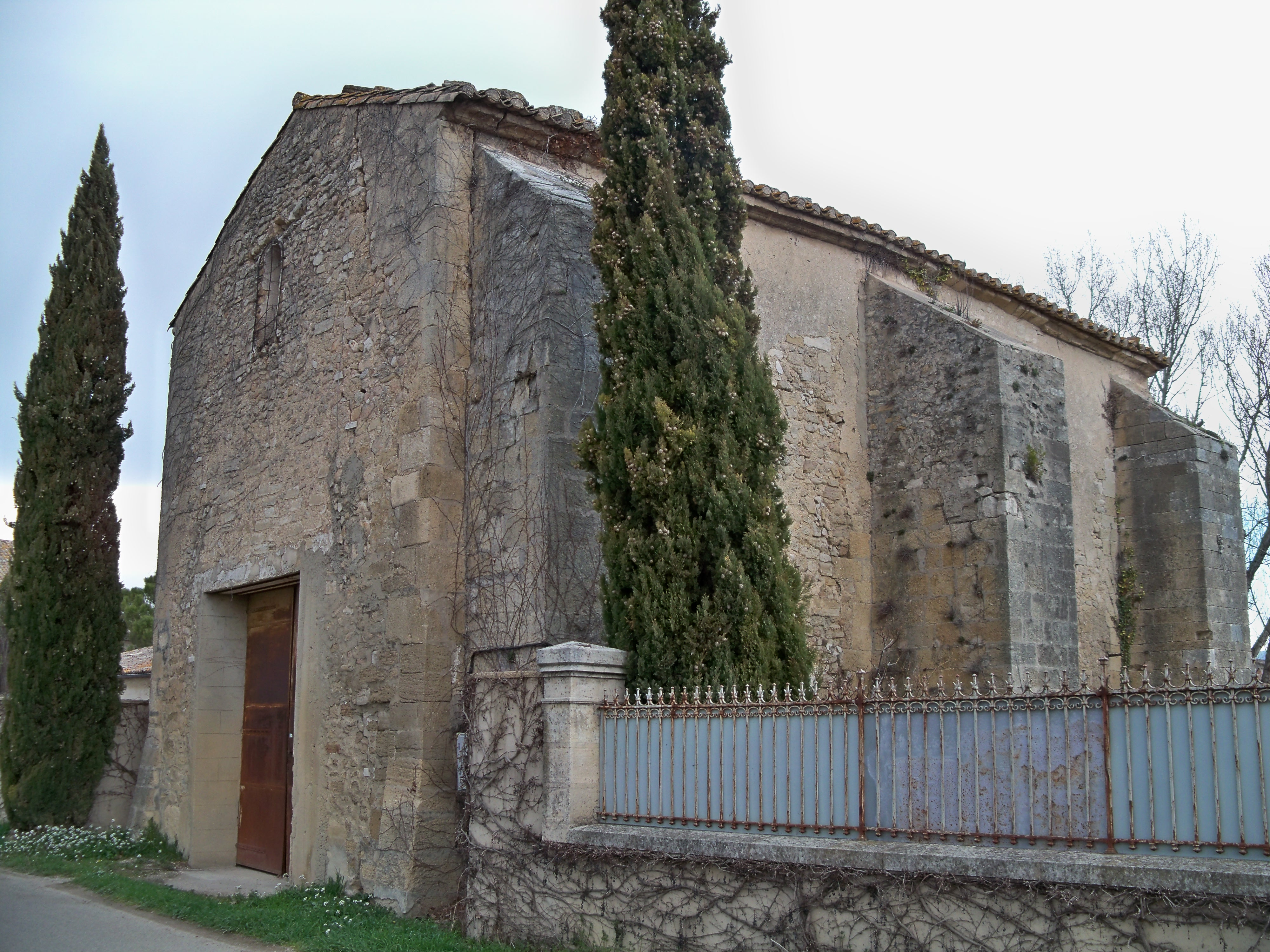 ancienne chapelle à Velorgues, hameau de l'Isle sur la Sorgue